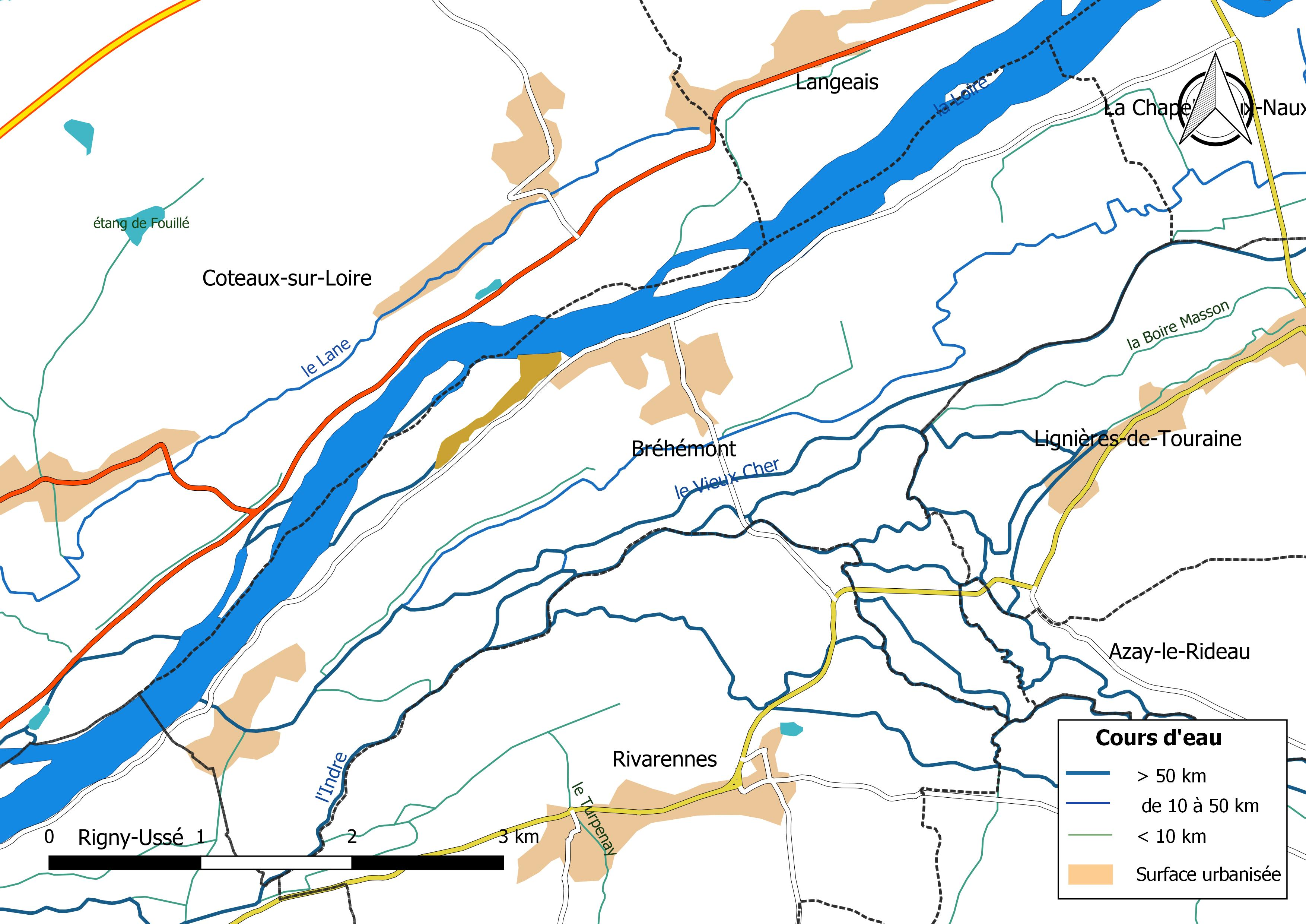 Carte du réseau hydrographique de la commune de Bréhémont (France).